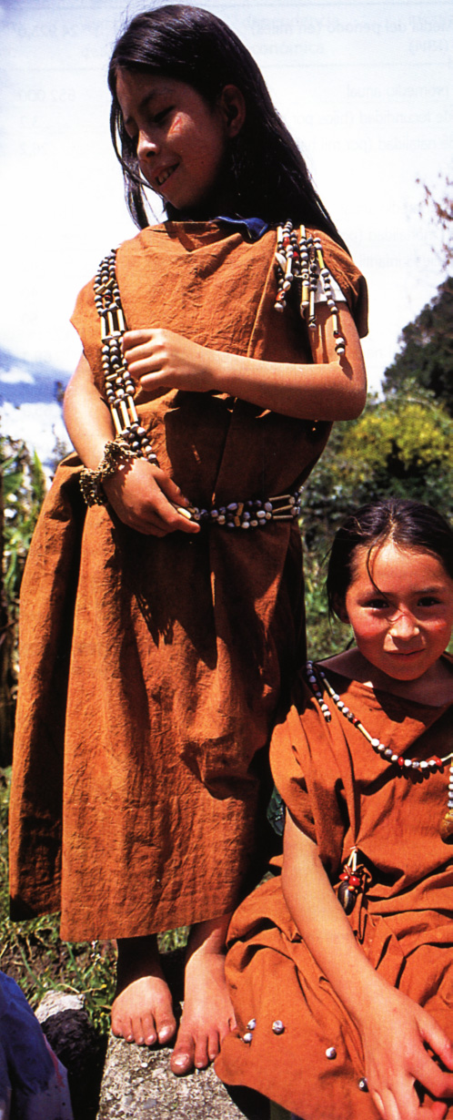 Niñas de la etnia amuesha o yanesha en la Amazonía peruana. Licensing Fotografía de Ari, licenciada bajo . --Ari 03:27 15 feb 2006 (CET)